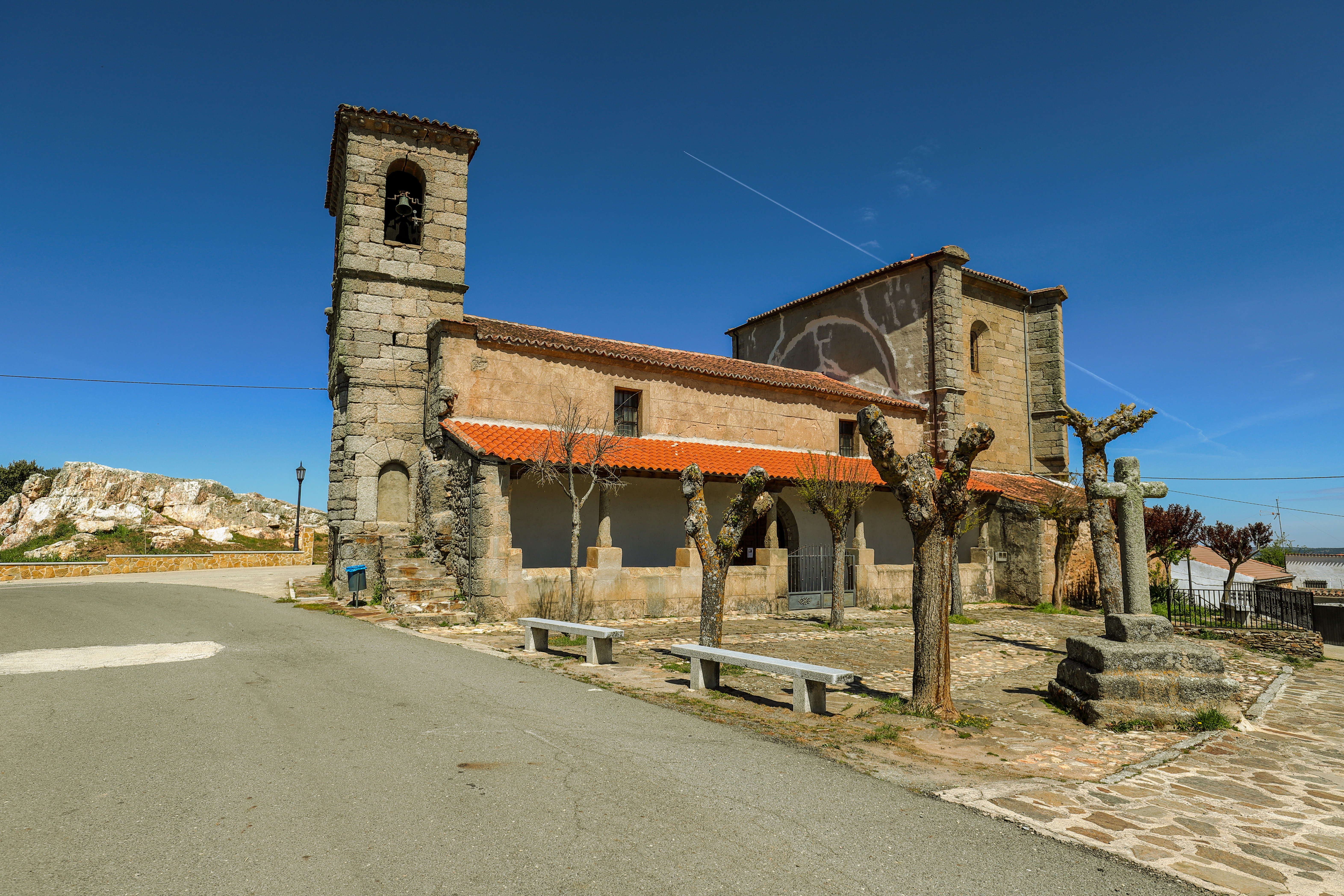 Guijo de Ávila es un municipio de la comarca Alto Tormes, provincia de Salamanca.